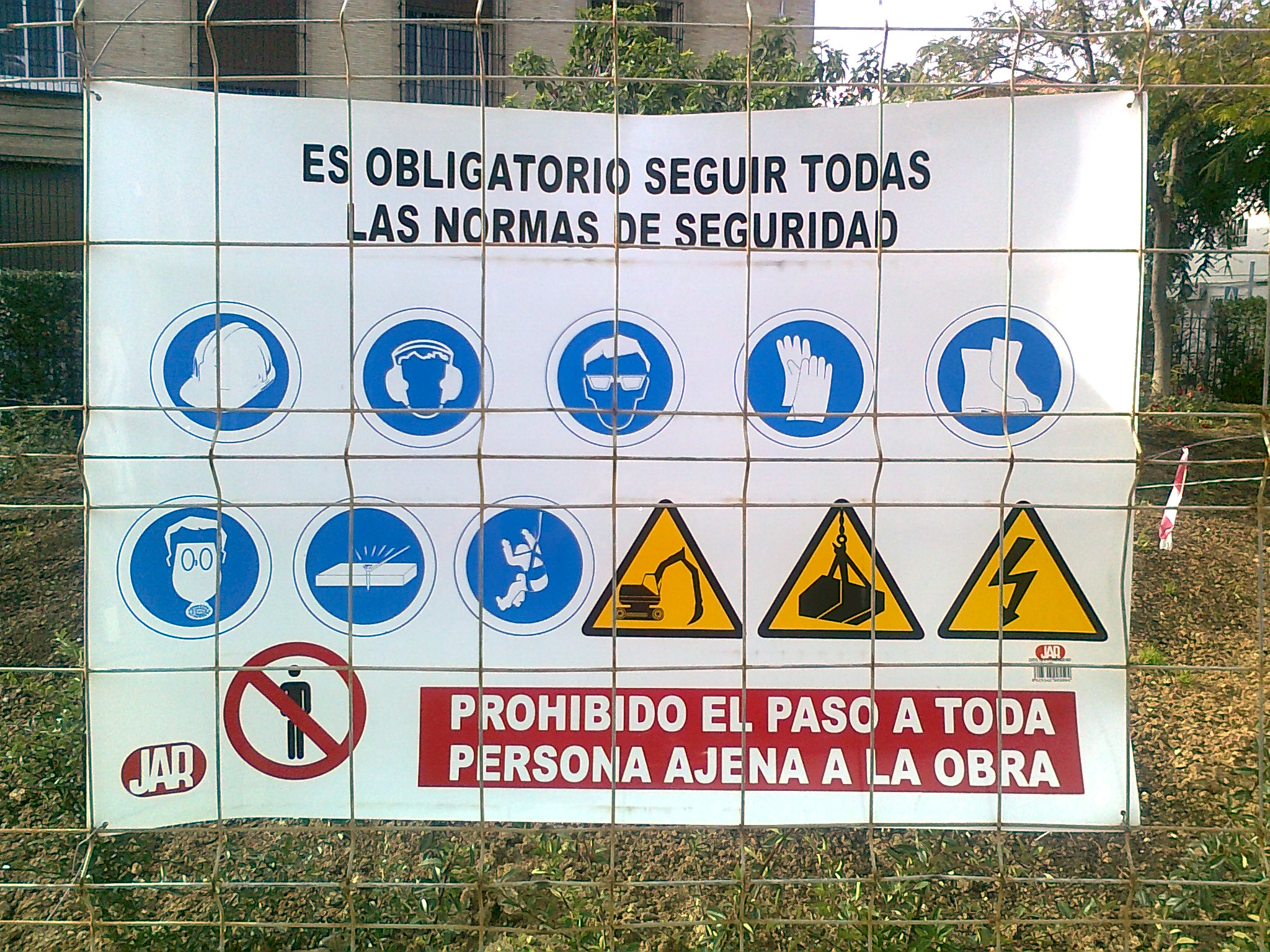 Cartel de medidas de seguridad obligatorias en construcción en España